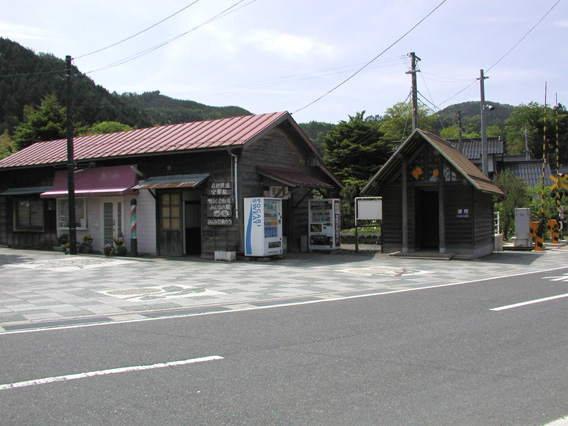 安部駅